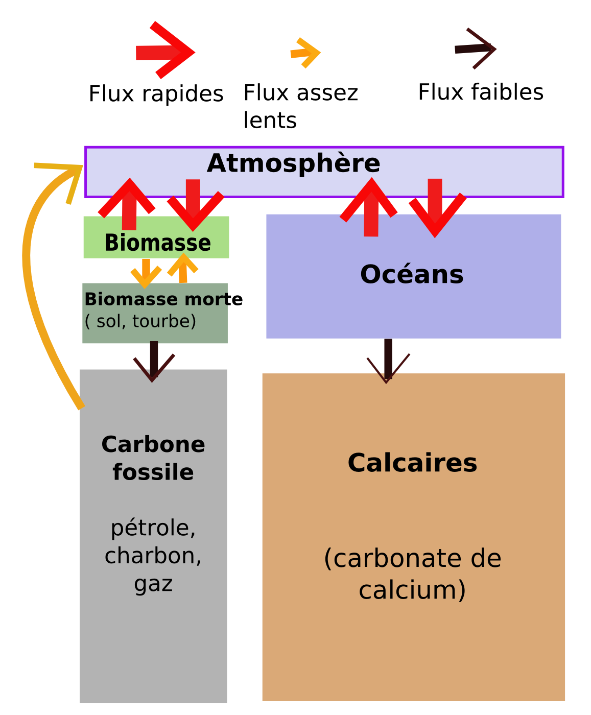 cycle du carbone simplifier